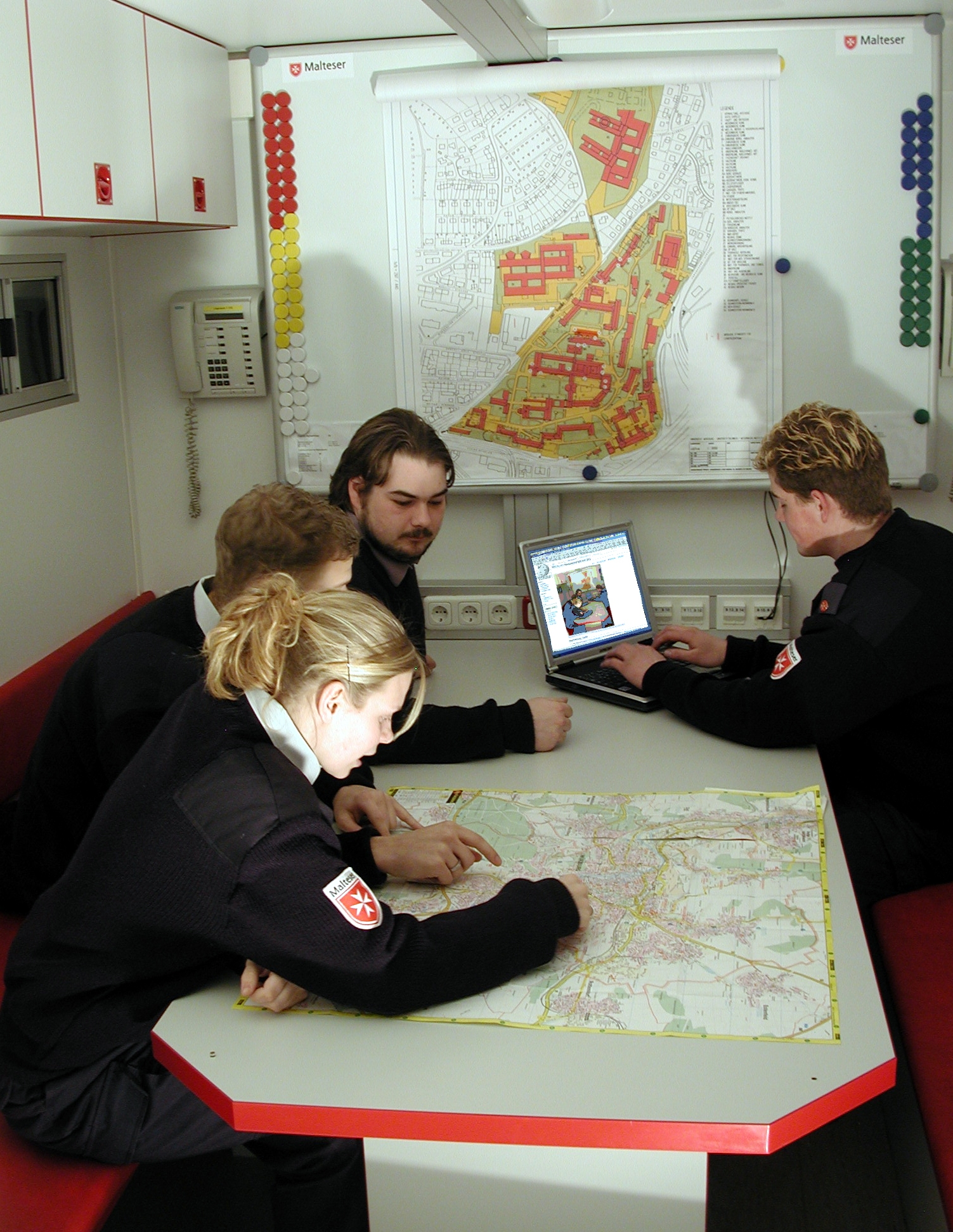 Besprechungsraum des Einsatzleitwagen 2 des Fernmeldezuges des Malteser Hilfsdienstes aus Würzburg